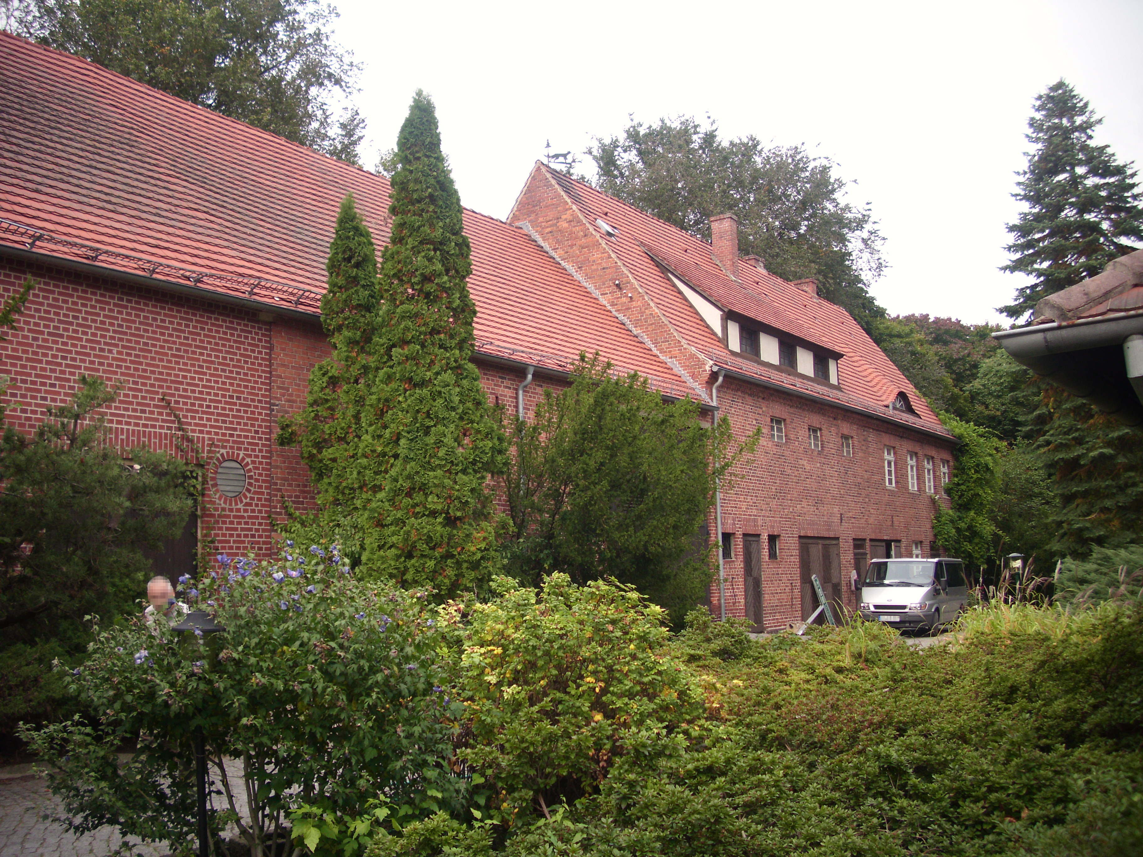 Nebengebäude mit ehemaligem Forstamtsbüro und darüber liegender Kutscherwohnung, Siehdichum, Brandenburg